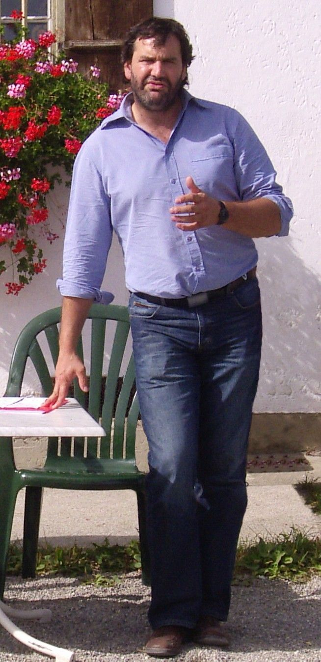 Sepp Daxenberger (Wahlkampfveranstaltung auf dem Taubenberg bei Miesbach)